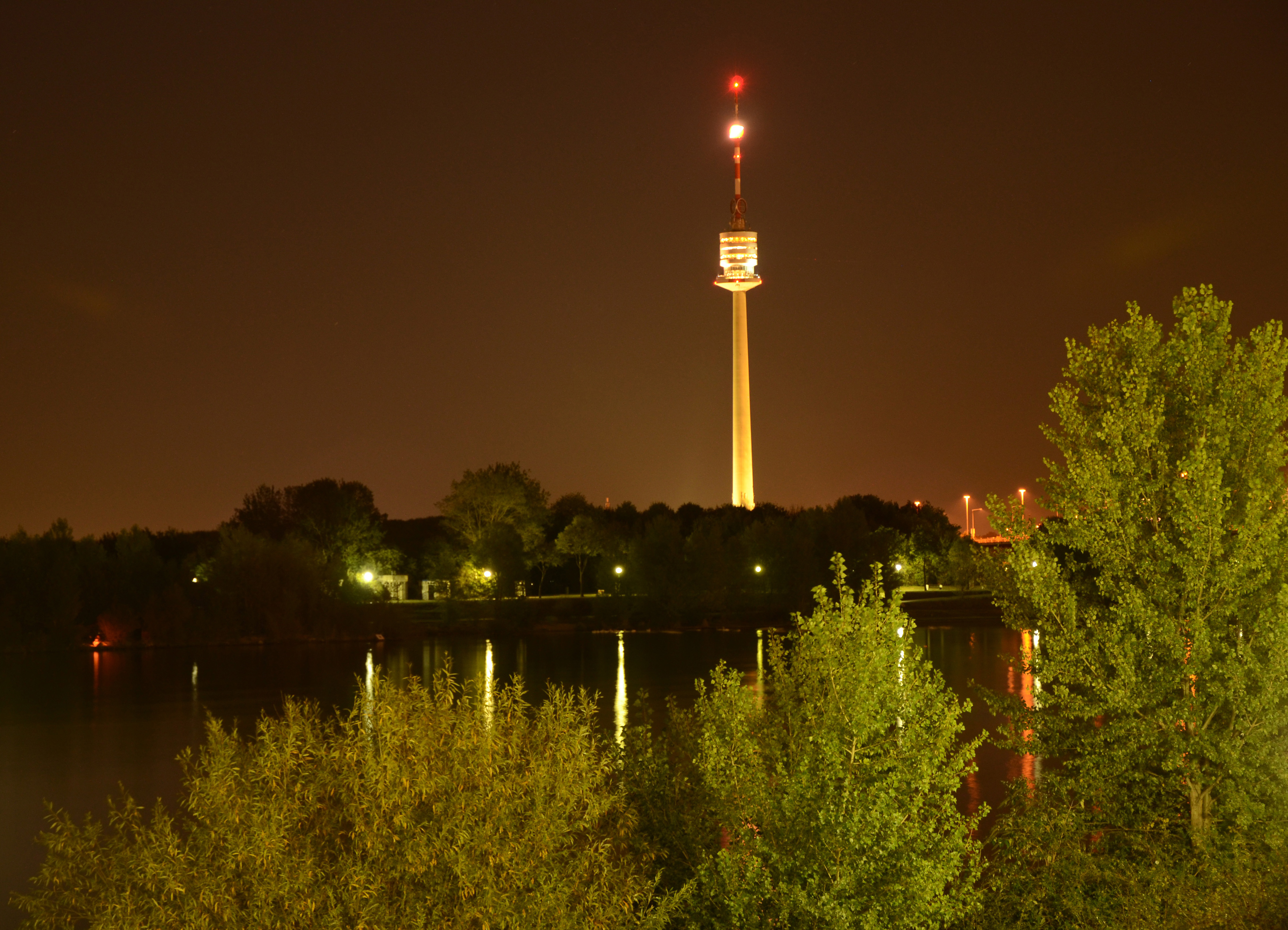 Austria - Vienna - Danube Tower view